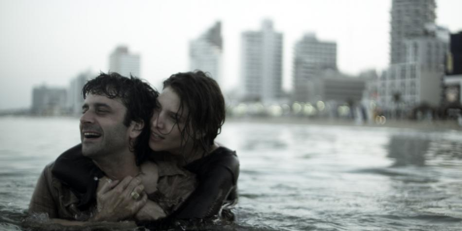 רוני הדר וגיא לואל ב"יותר איטי מלב", סרטם של ינאי גוז ויוני זיכהולץ, 2012